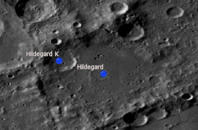 Cráter lunar Hildegard. Cráteres satélite. (Imagen LRO)